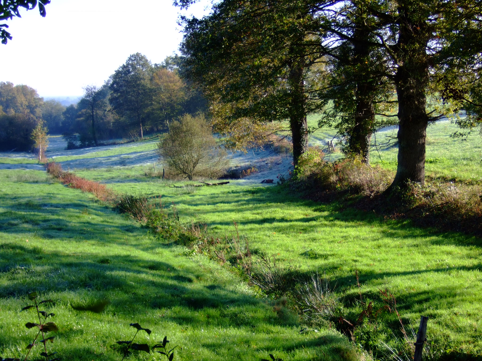 Paysage rural du Boischaut sud à Reigny, près du hameau de Maugenest - Photo amateur prise par moi-même